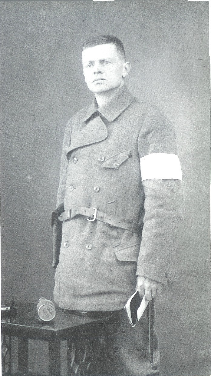 Martti Pihkala vuonna 1918